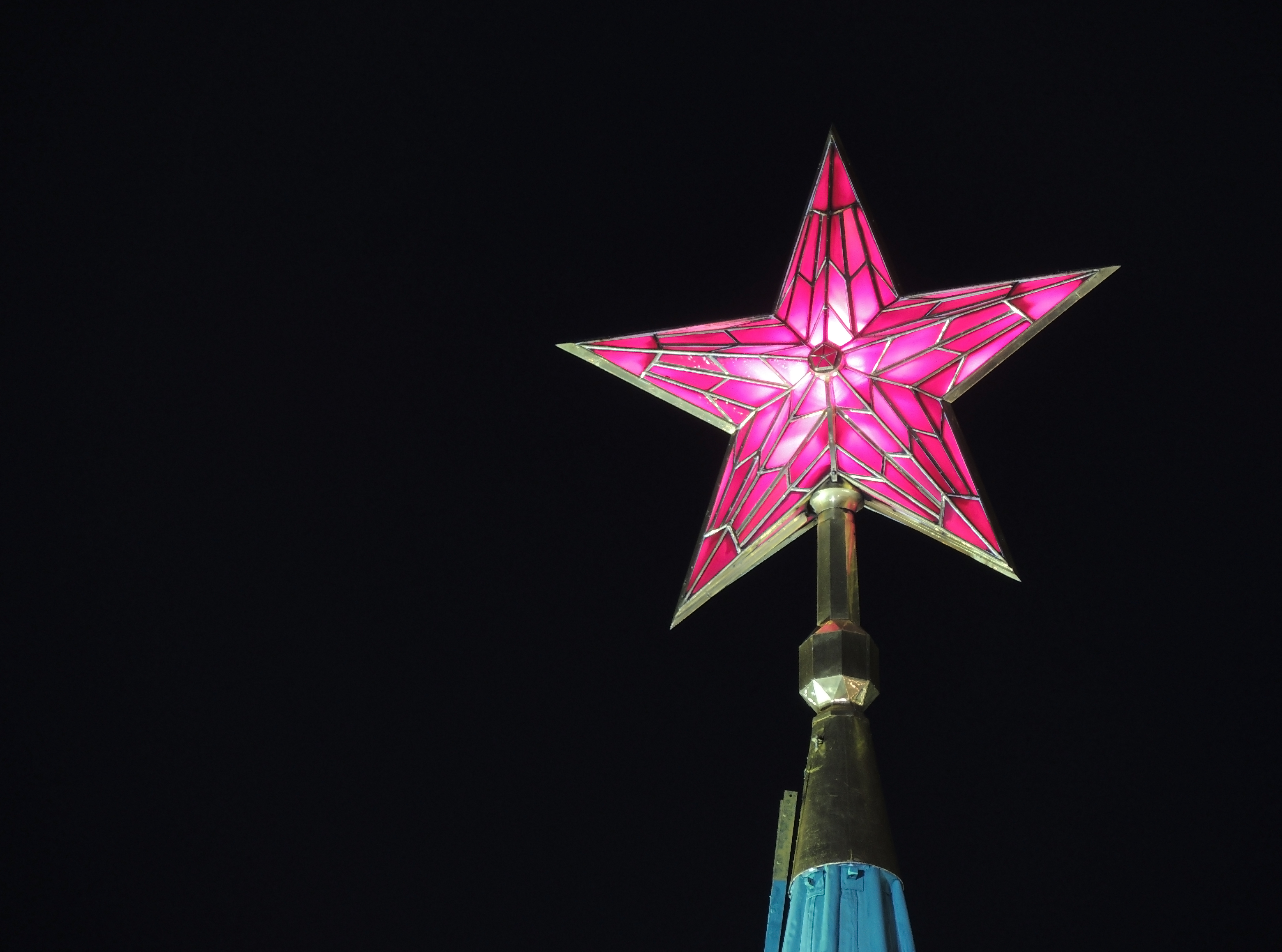 Московский Кремль (Москва и Московская область, Москва, Красная площадь, Кремлевская наб., Александровский сад)